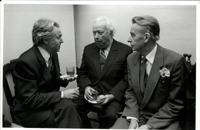 Sõbrad omavahel Sophokleses: Huno Rätsep, Juhan Peegel, Heino Ahven.